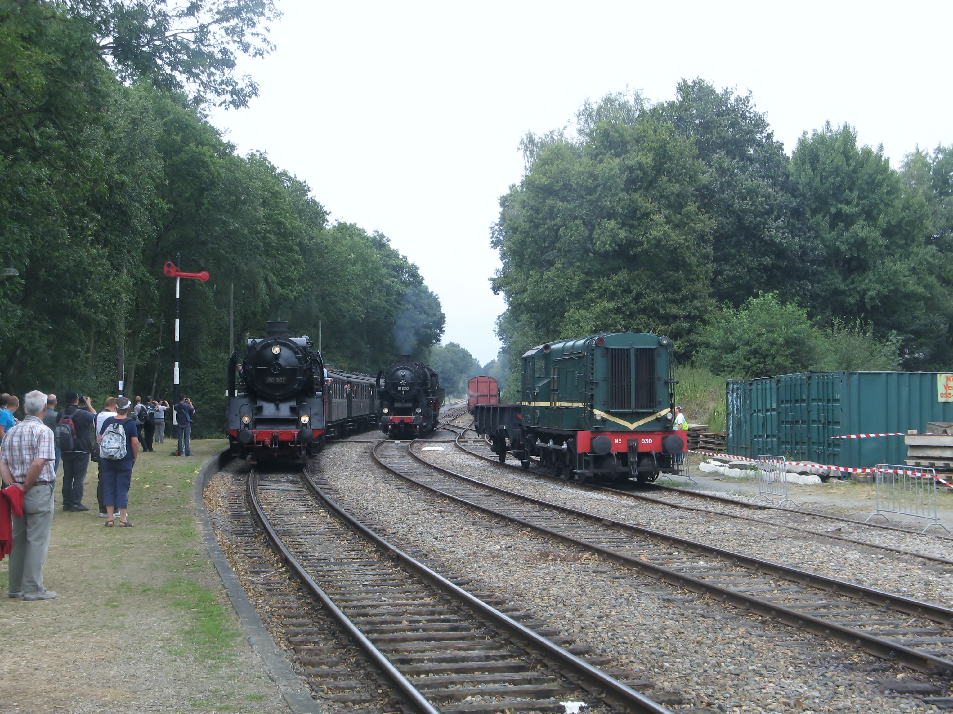 Zwei Dampfzüge, bespannt mit DR 50 307 (in den Altbauzustand zurückgerüstet aus DR 50 3564) und DR 52 8053 bei der "Veluwsche Stoomtrein Maatschappij" Museumseisenbahn.